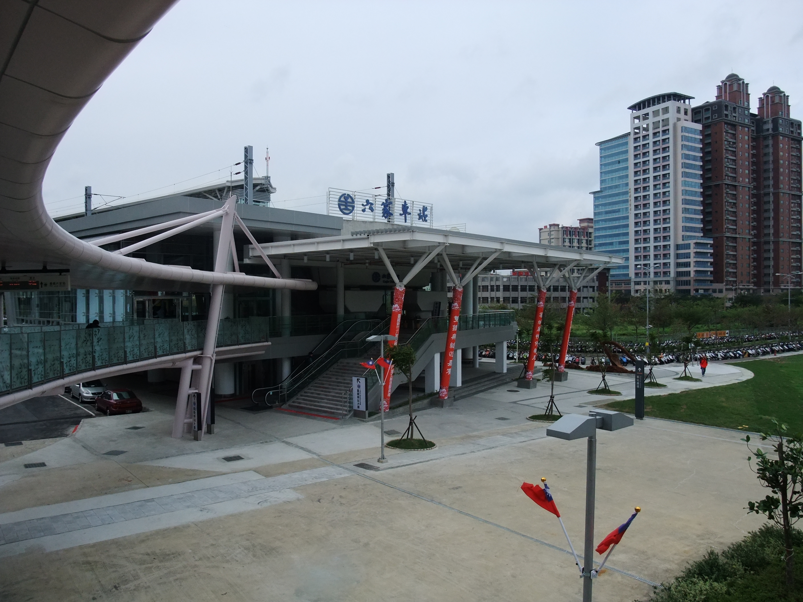 六家火車站。